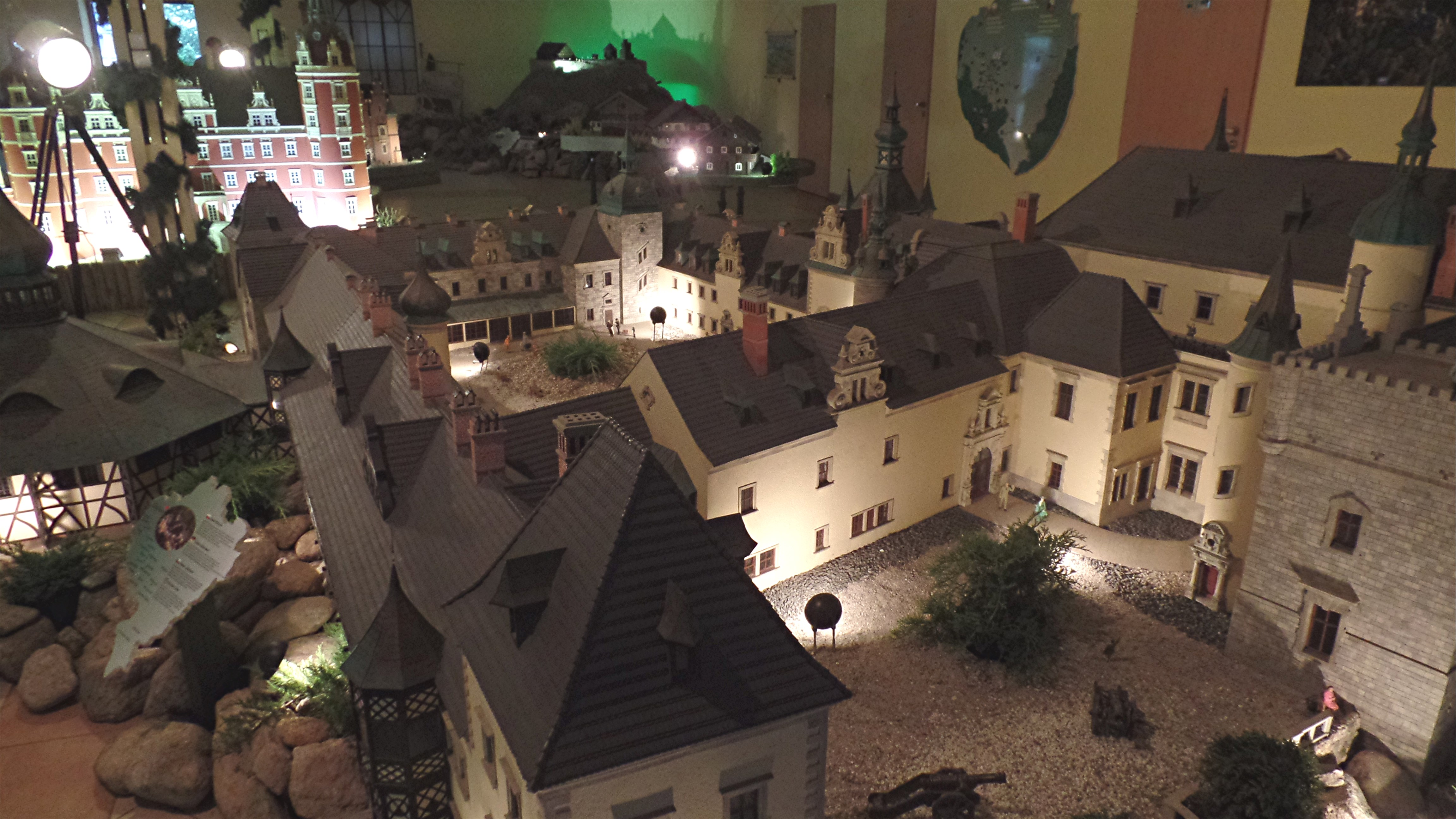 Modell des Schlosses im Miniaturpark Kowary